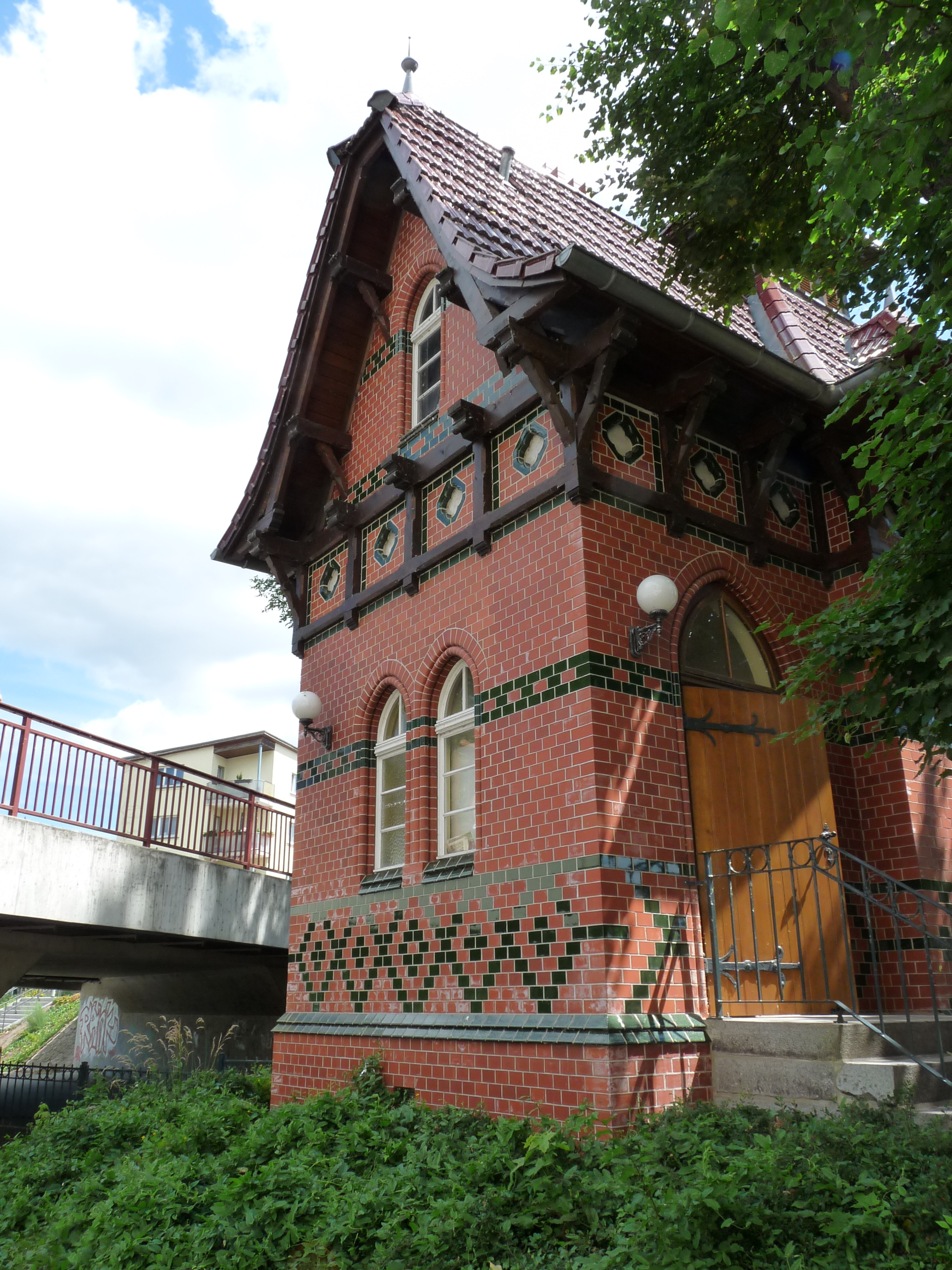 Das restaurierte Schleusenbetriebsgebäude.